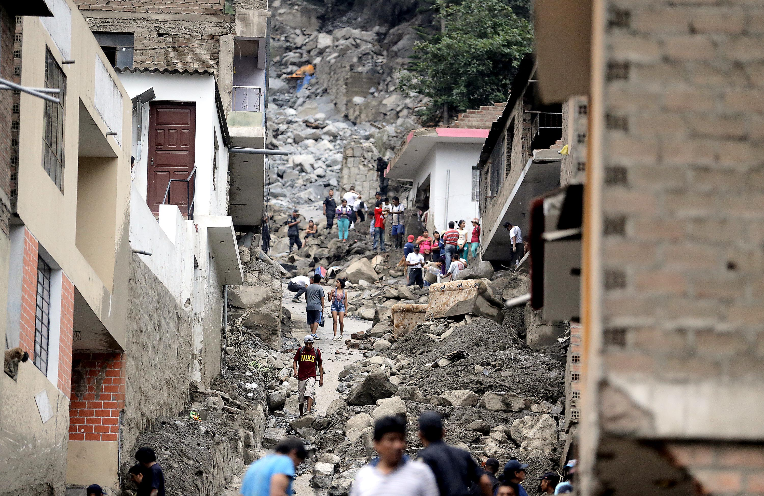 Apenas ocurrida la emergencia por la caída de huaicos en Chosica, el Ejército del Perú se hizo presente para asistir a las familias damnificadas y apoyar en la limpieza y remoción de escombros. Trescientos soldados pertenecientes a la 18 Brigada Blindada y 1ra Brigada de Fuerzas Especiales, permanecen en la zona afectada, trabajando para restablecer la tranquilidad.